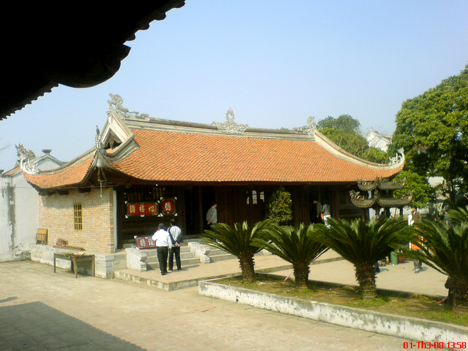 Đền Trùng Hoa trong đền Trần, thành phố Nam Định, Việt Nam.